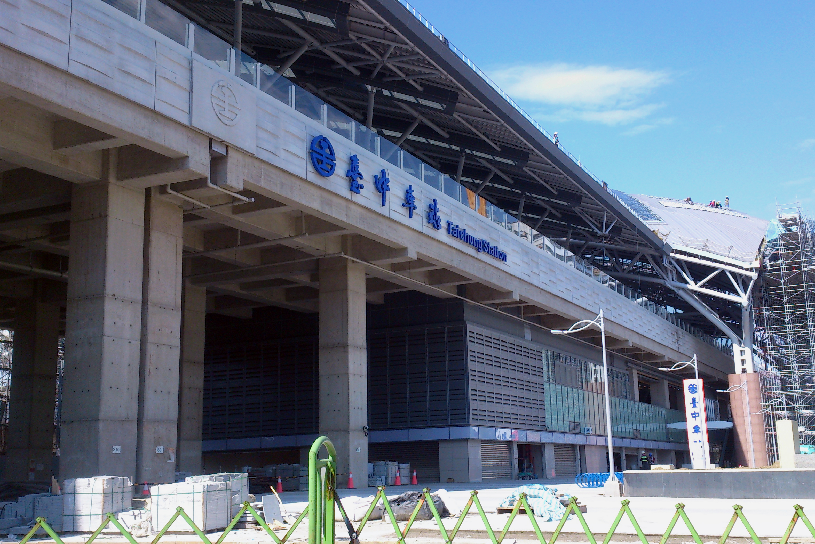 第三代台中車站(2016.08)